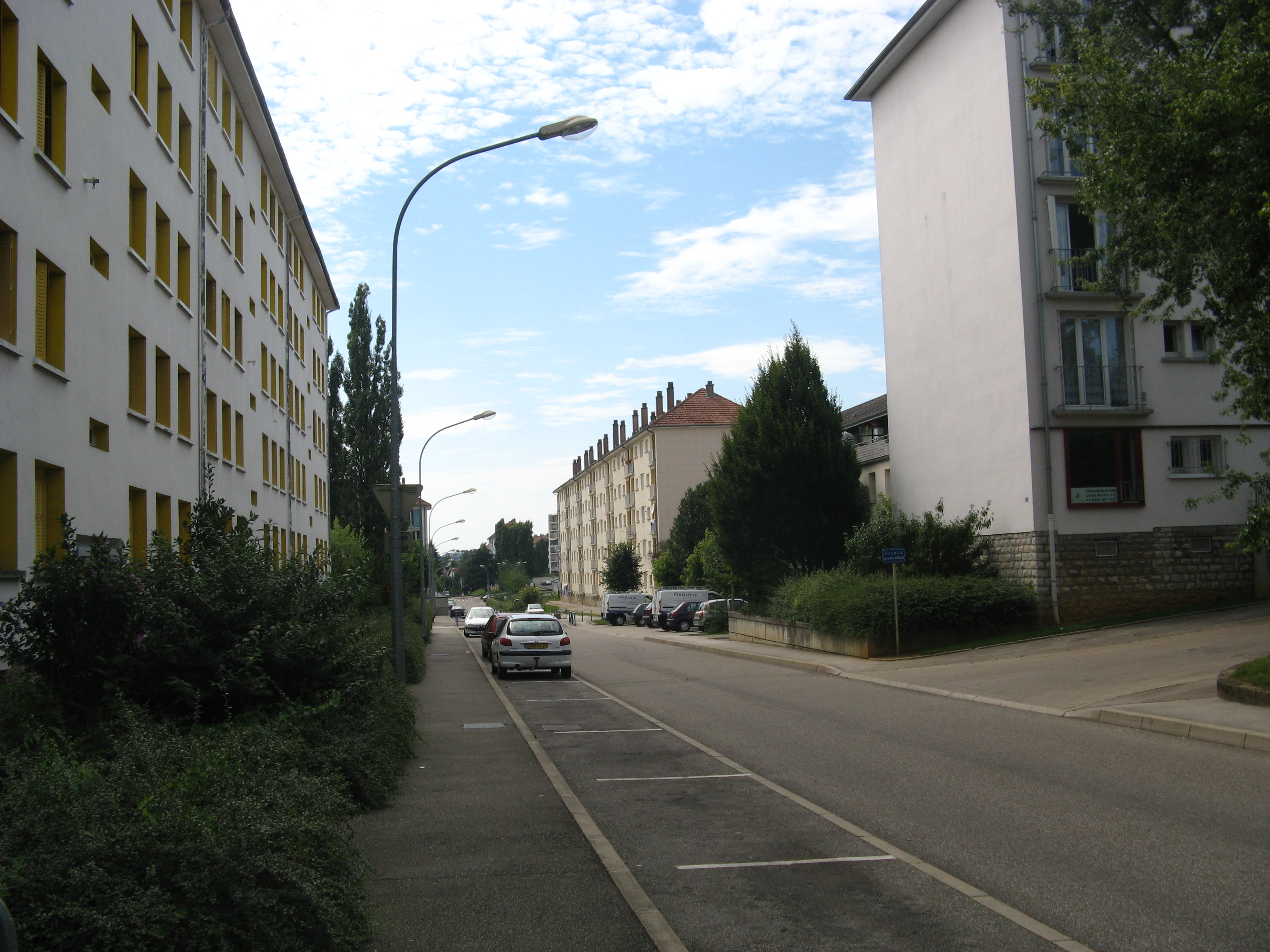 Orchamps